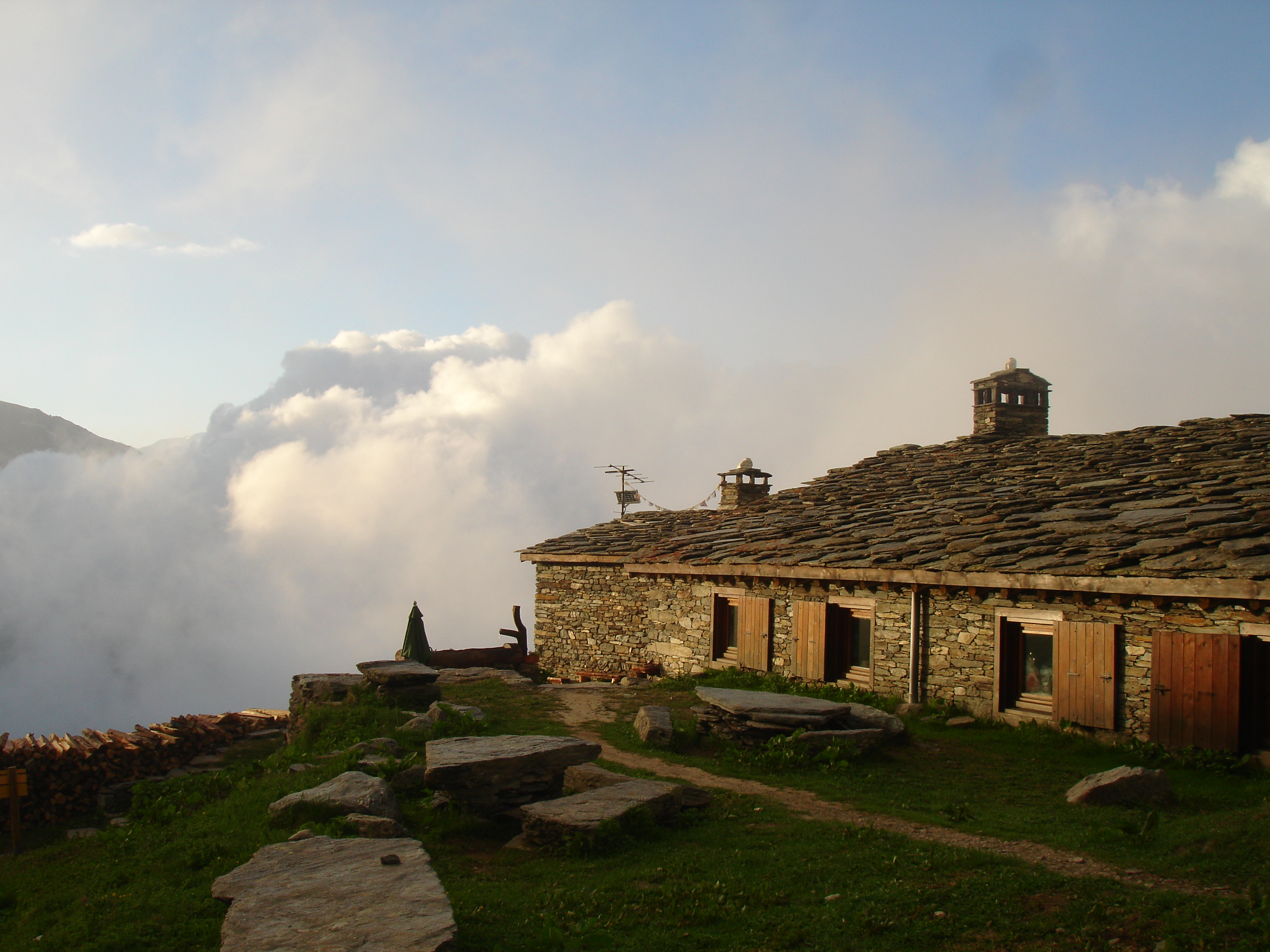 Vue du Refuge de l'Arpont à 2309m d'altitude.